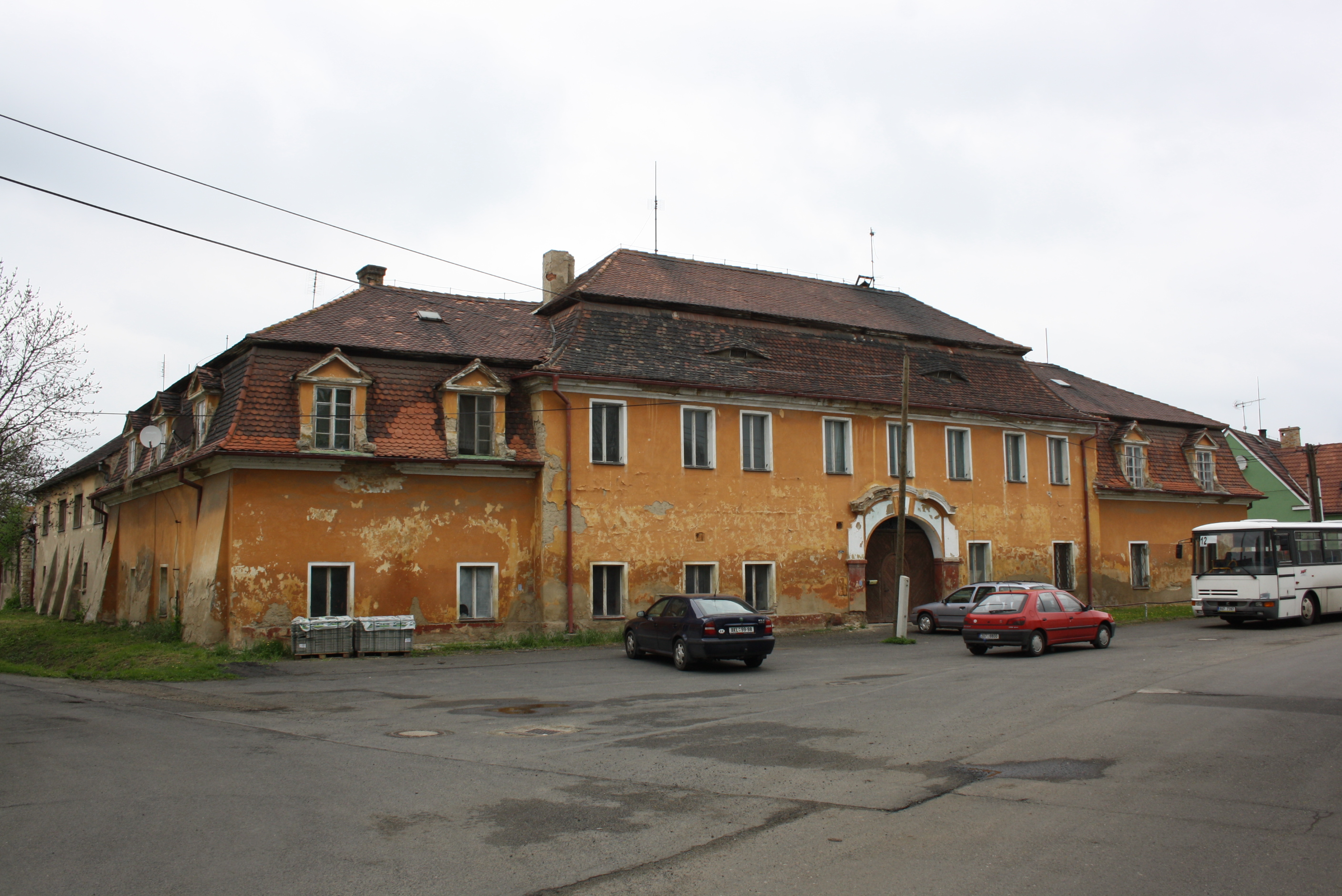 Zámek (číslo popisné 24) v obci Lukavec u Litoměřic.